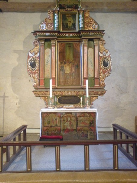 Altertavle og alter i Skaun kirke